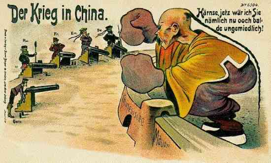 Der Krieg in China, Postkarte zum Boxeraufstand mit der Darstellung der an der Niederschlagung beteiligten Staaten, 1900 DHM, Berlin PK 96/523, Text: "Härnse, jetz wär ich Sie nämlich nu ooch balde ungemiedlich!"